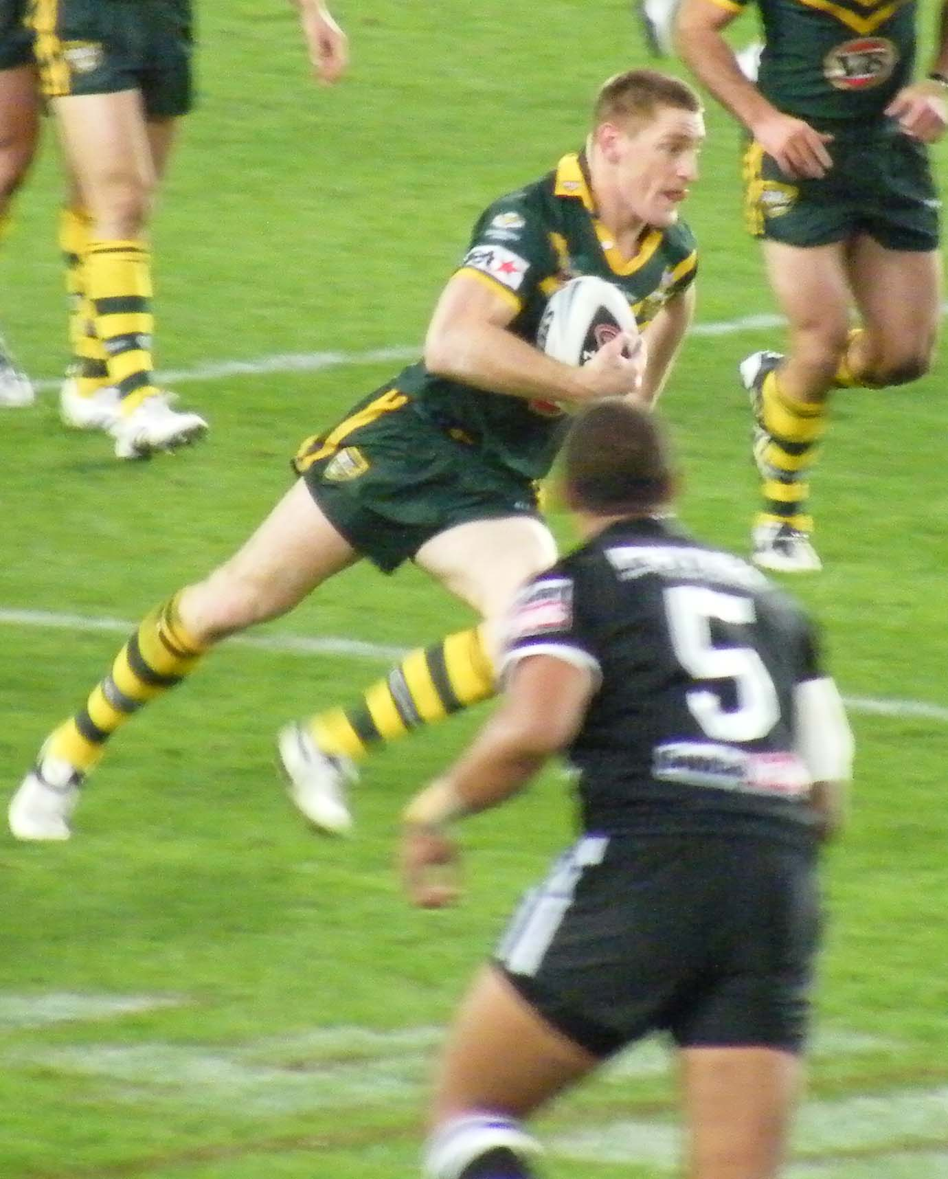 Ausralian Winger Brent Tate. RLWC 2008